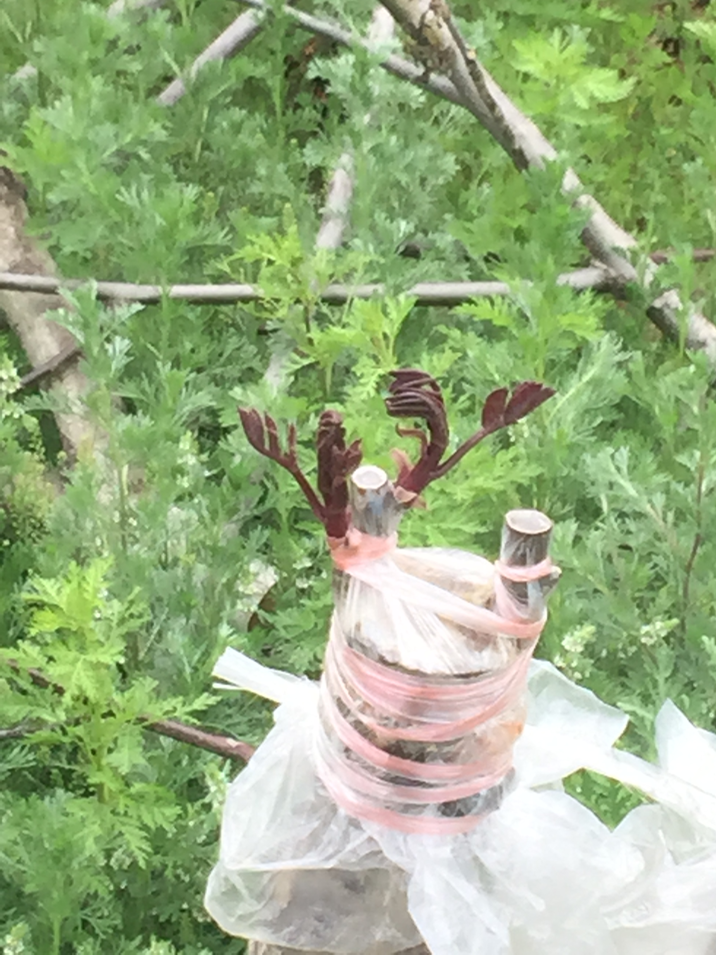 中文（中国大陆）: 紫京彩叶核桃树嫁接